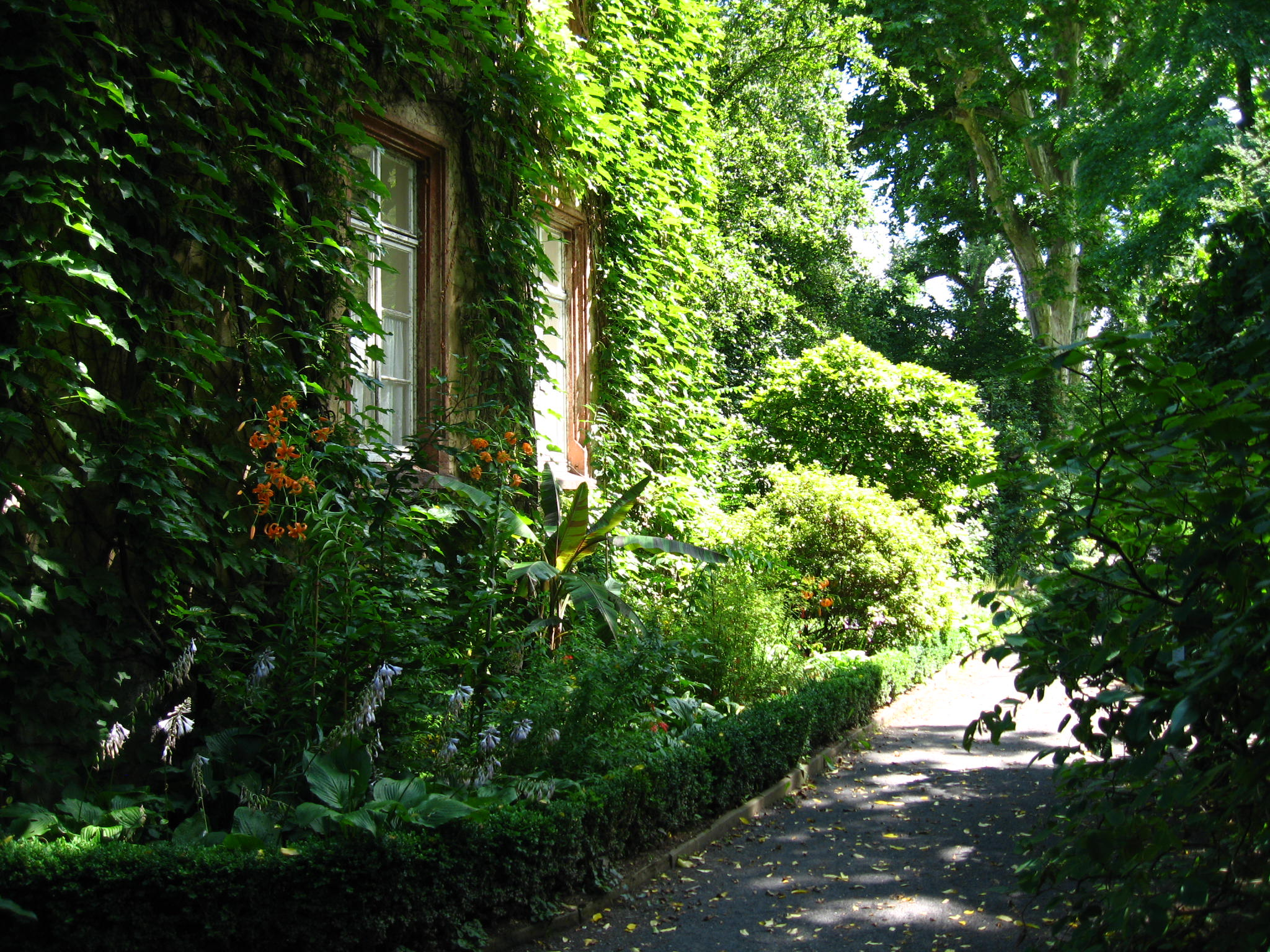 Mit wildem Wein (Dreispitz-Jungfernrebe - Parthenocissus tricuspidata) überwachsenes Haus im Botanischen Garten Giessen